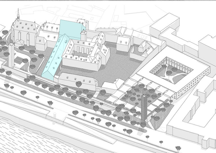 1 фаза строительства. Костел Святого Франциска и восточное крыло конвента